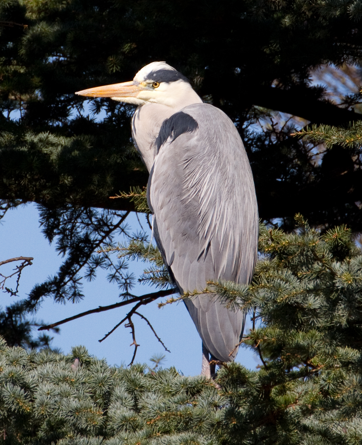 Heron